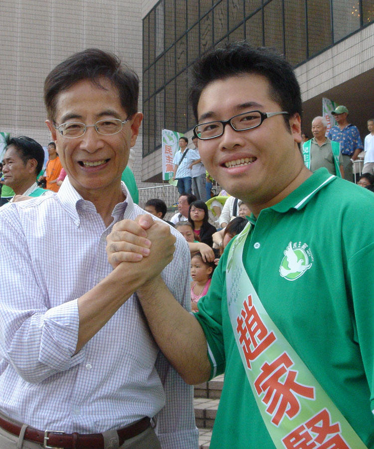 中文（香港）: 趙家賢（Andrew Chiu)，本照片攝於2007年民主黨區議會選舉誓師大會中，由本人自行拍攝。照片未曾在其他網站或地方發佈。